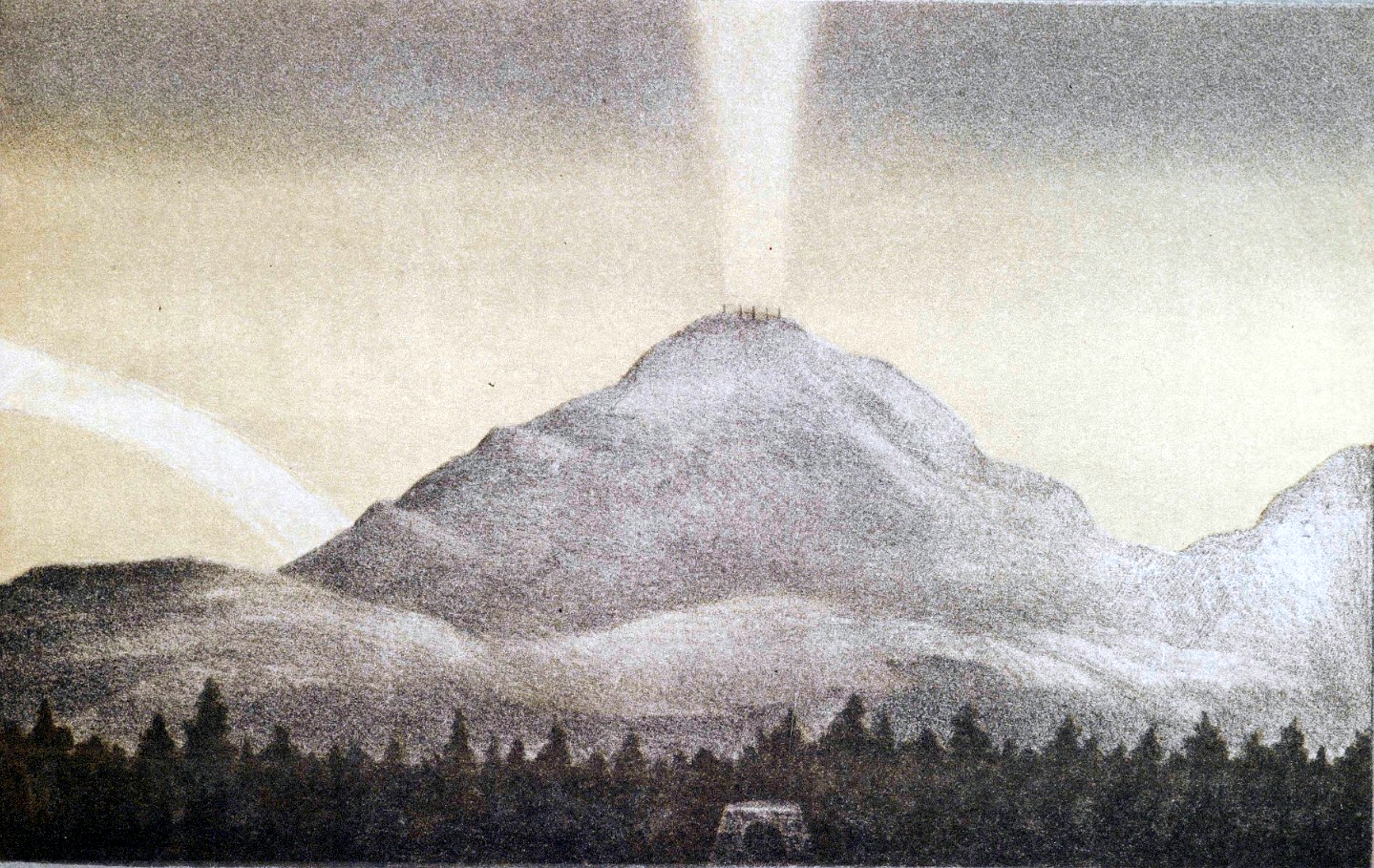 Von Selim Lemström am 29. Dezember 1882 künstlich erzeugtes "Polarlicht" über dem Berg Pietarintunturi bei Kultala im finnischen Lappland. Lithografie von Ferdinand Tilgmann (1832–1911) nach einer Vorlage von Frans Maexmontan (1847–1901) oder Frederik Collett (1839–1914)